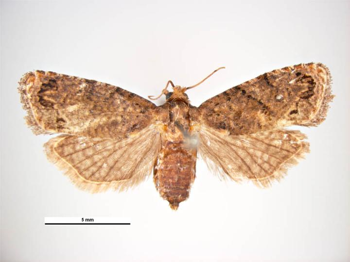 Thaumatotibia leucotreta female, dorsal view